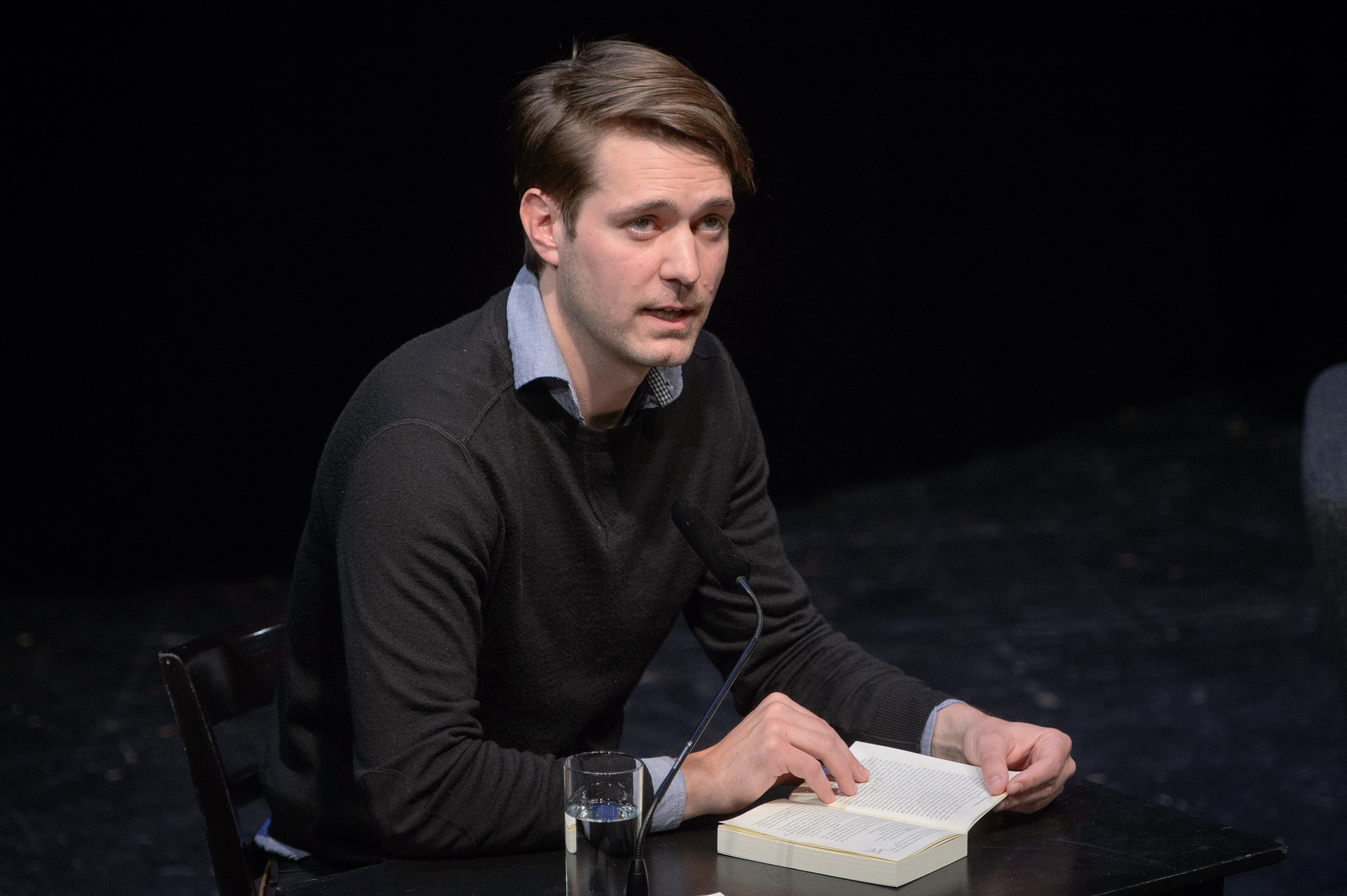 Daniel Hoevels (Schauspieler, Deutsches Theater, Berlin), Foto